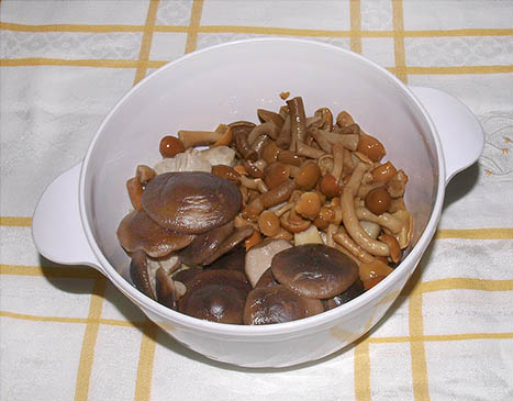 Setas